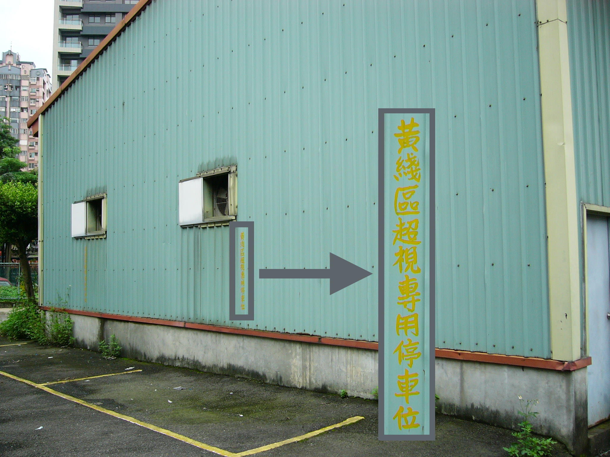 臺北市南港區興南街，超級電視台與中國電視公司策略聯盟時期，合用中視大樓後方停車場。停車場鐵皮屋上的「黃綫區超視專用停車位」字樣即是當時的印記，2019年10月31日重訪時已塗銷。